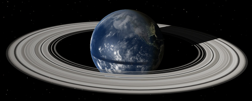 Кольца Земли: симуляция в программе Celestia